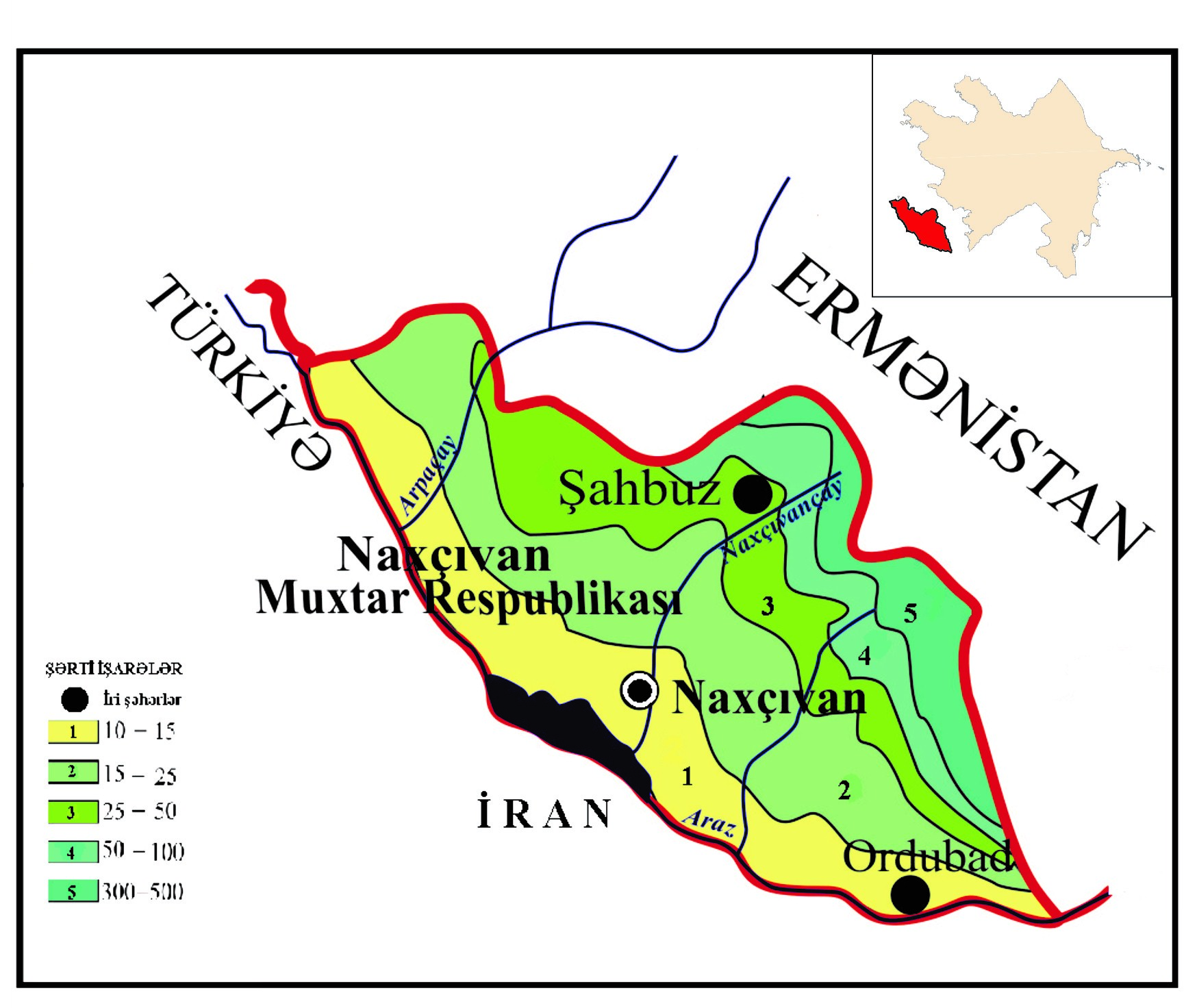 Orta Araz təbii vilayətində çayların illik yeraltı axımı, mm